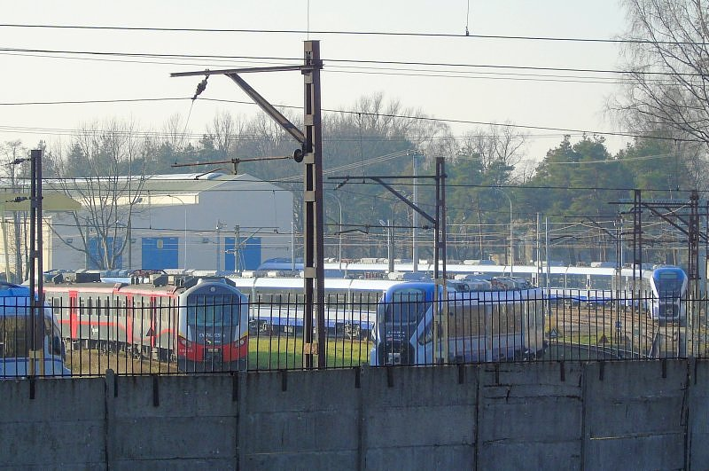 Elektryczne zespoły trakcyjne na bocznicy zakładowej ZNTK Mińsk Mazowiecki. W tle widoczna hala serwisowa elektrycznych zespołów trakcyjnych Pesa Dart.